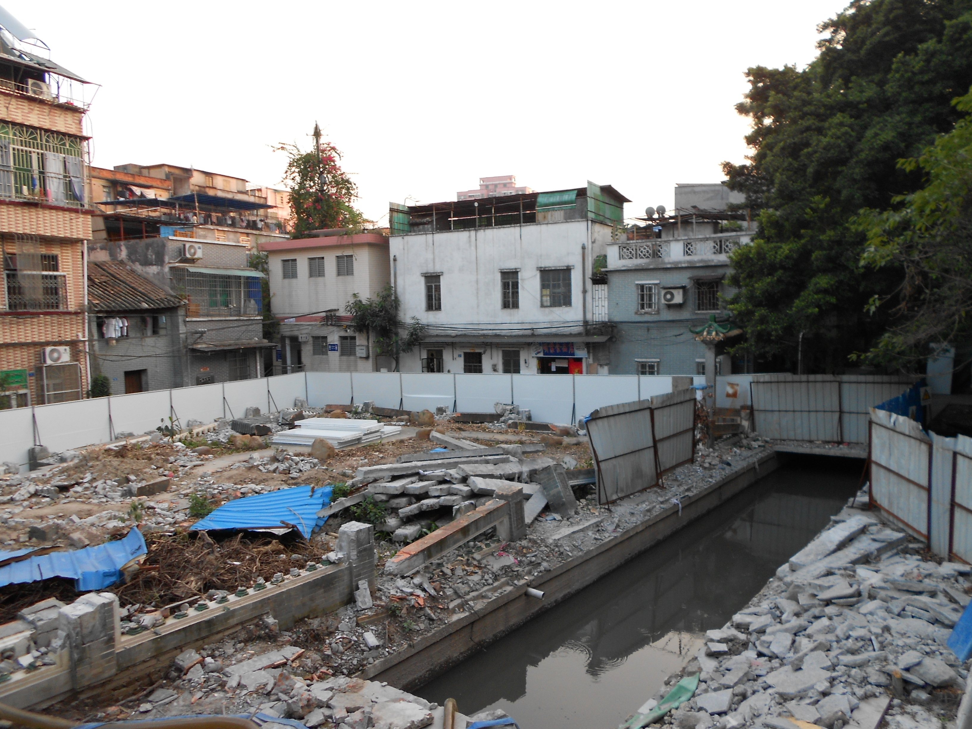 這是西關培正小學門口正對面的昌華涌紅雲苑，因進行荔枝灣河涌揭蓋工程而被弄得支離破碎。